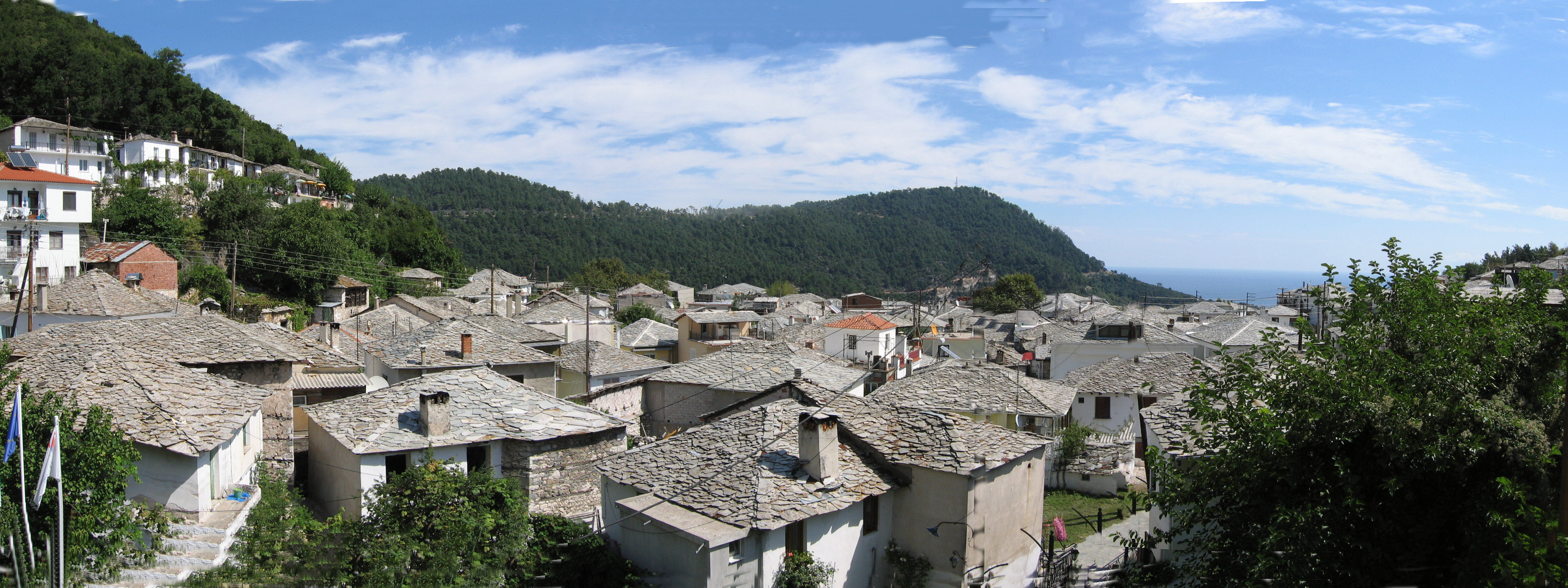 Schieferdächer von Panagia